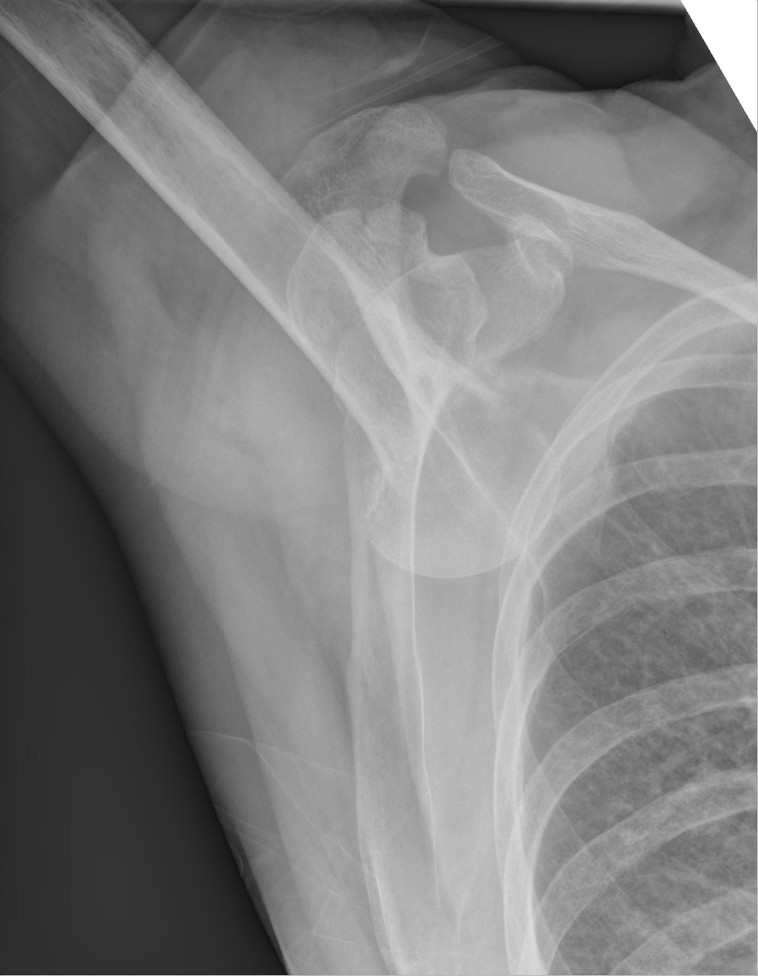 Untere Schulterluxation mit Fixierung des Humerus in nach oben gerichteter Position (Luxatio erecta). Zusätzlich Fraktur des Humeruskopfes und fraglich des Glenoids.